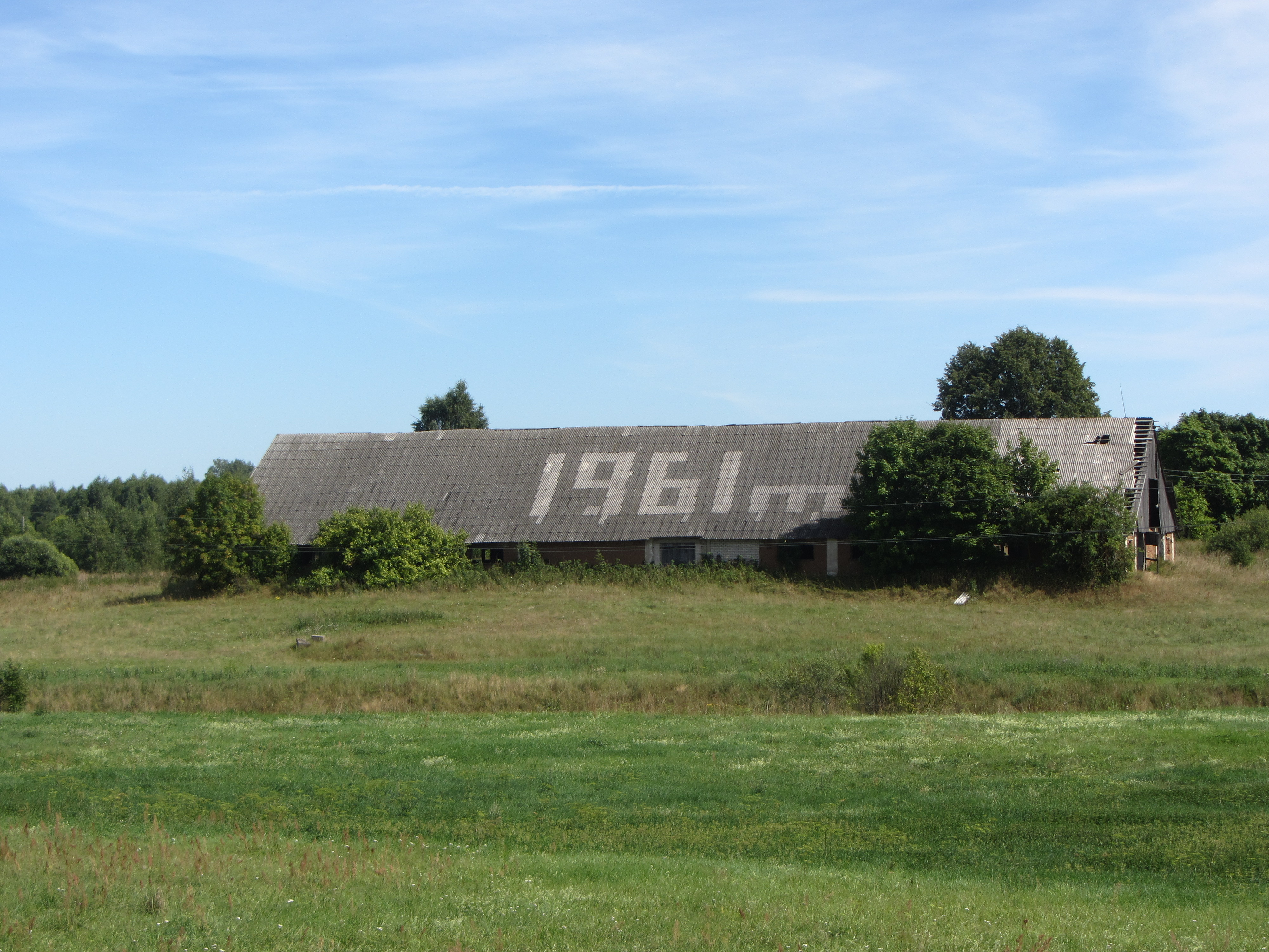 Užpalių sen., Lithuania